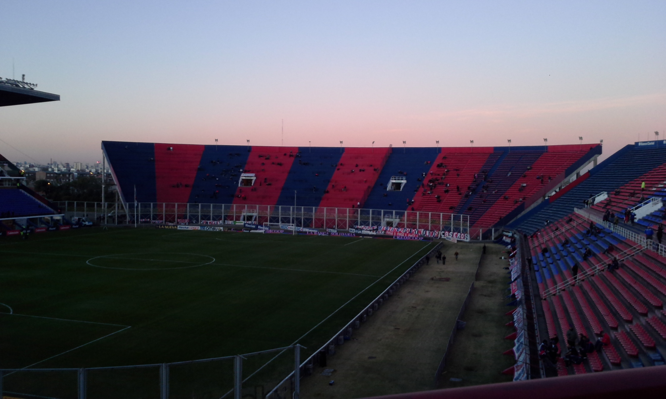 Platea Este Nuevo Gasometro (San Lorenzo de Almagro)